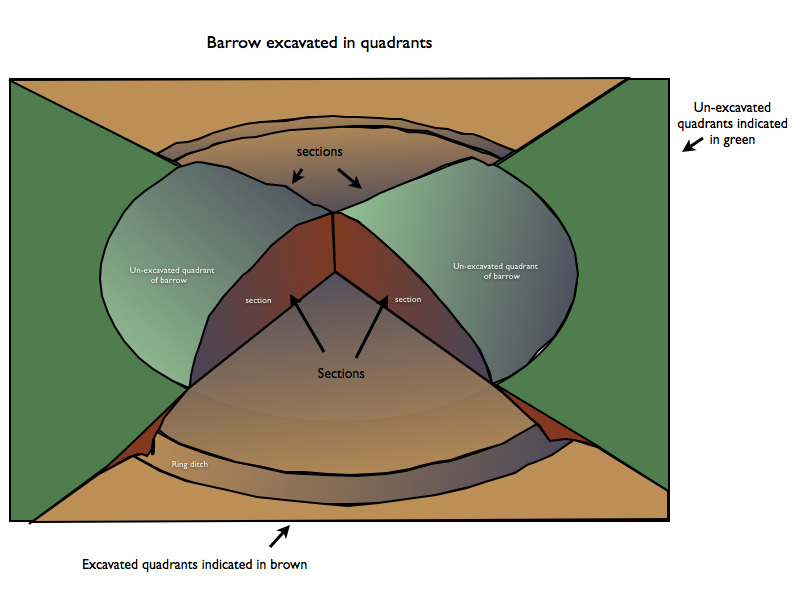 excavation by quadrants